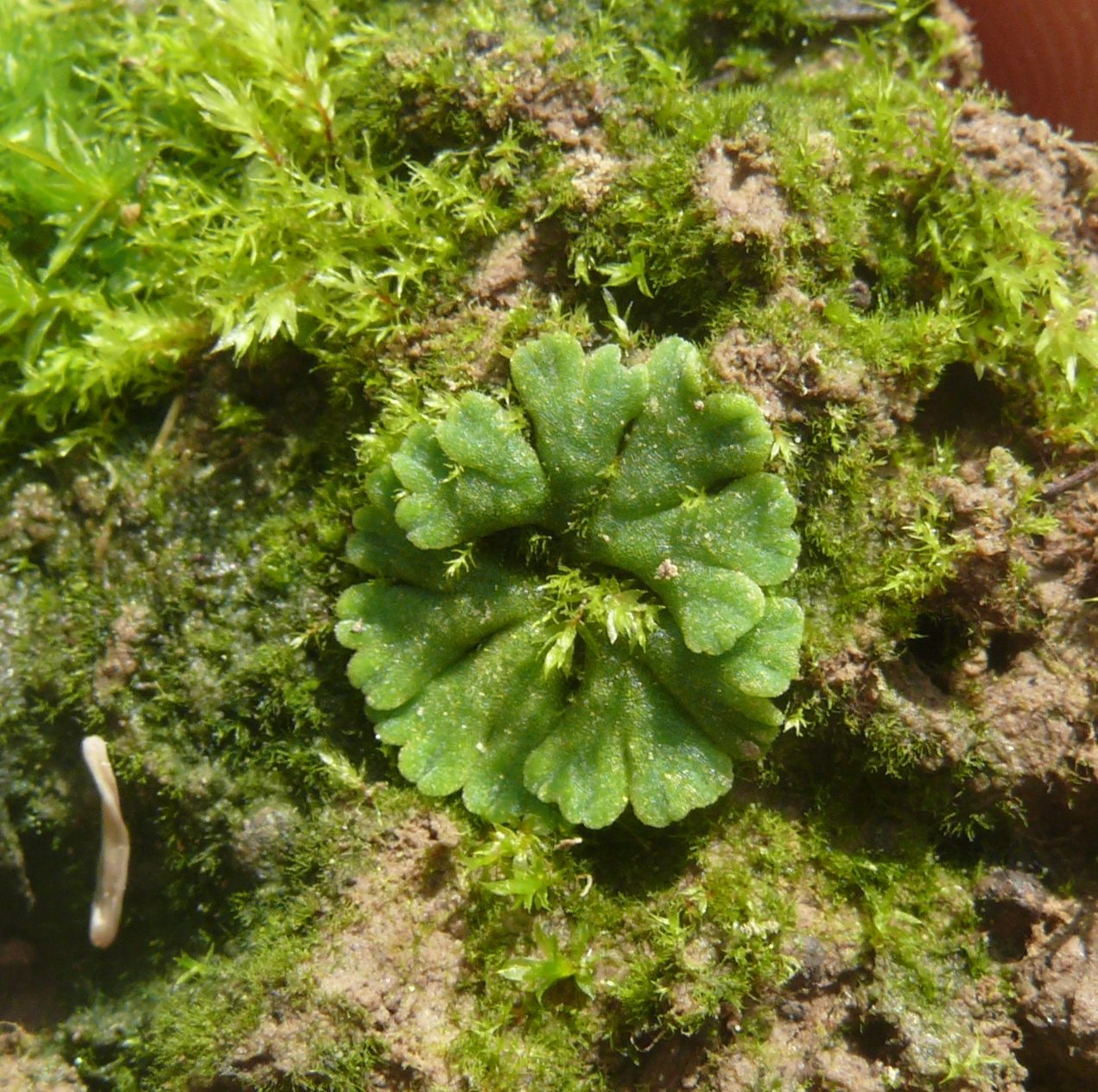 Riccia glauca, Hohenloher Ebene, Deutschland